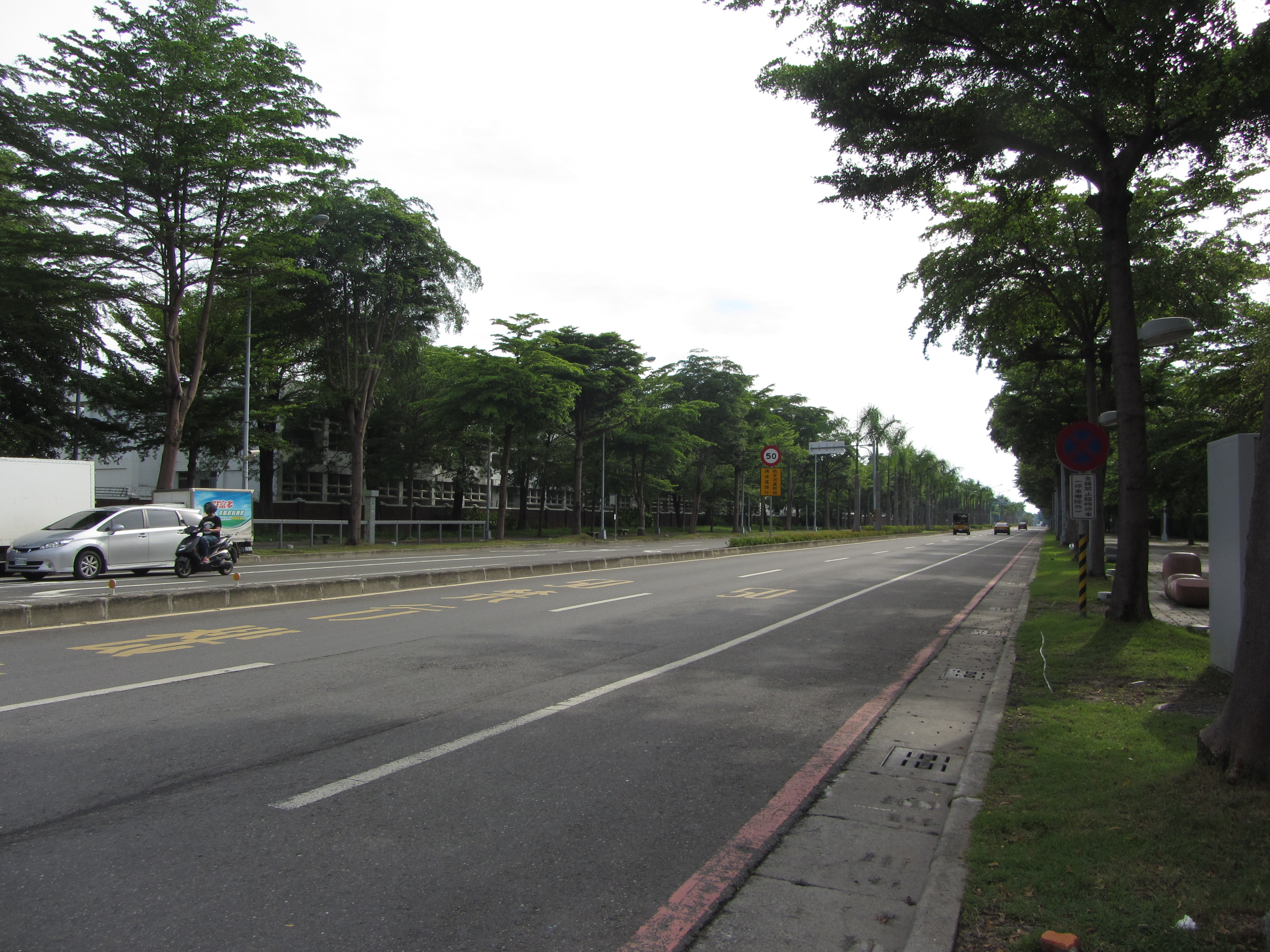 高雄市左營區世運大道